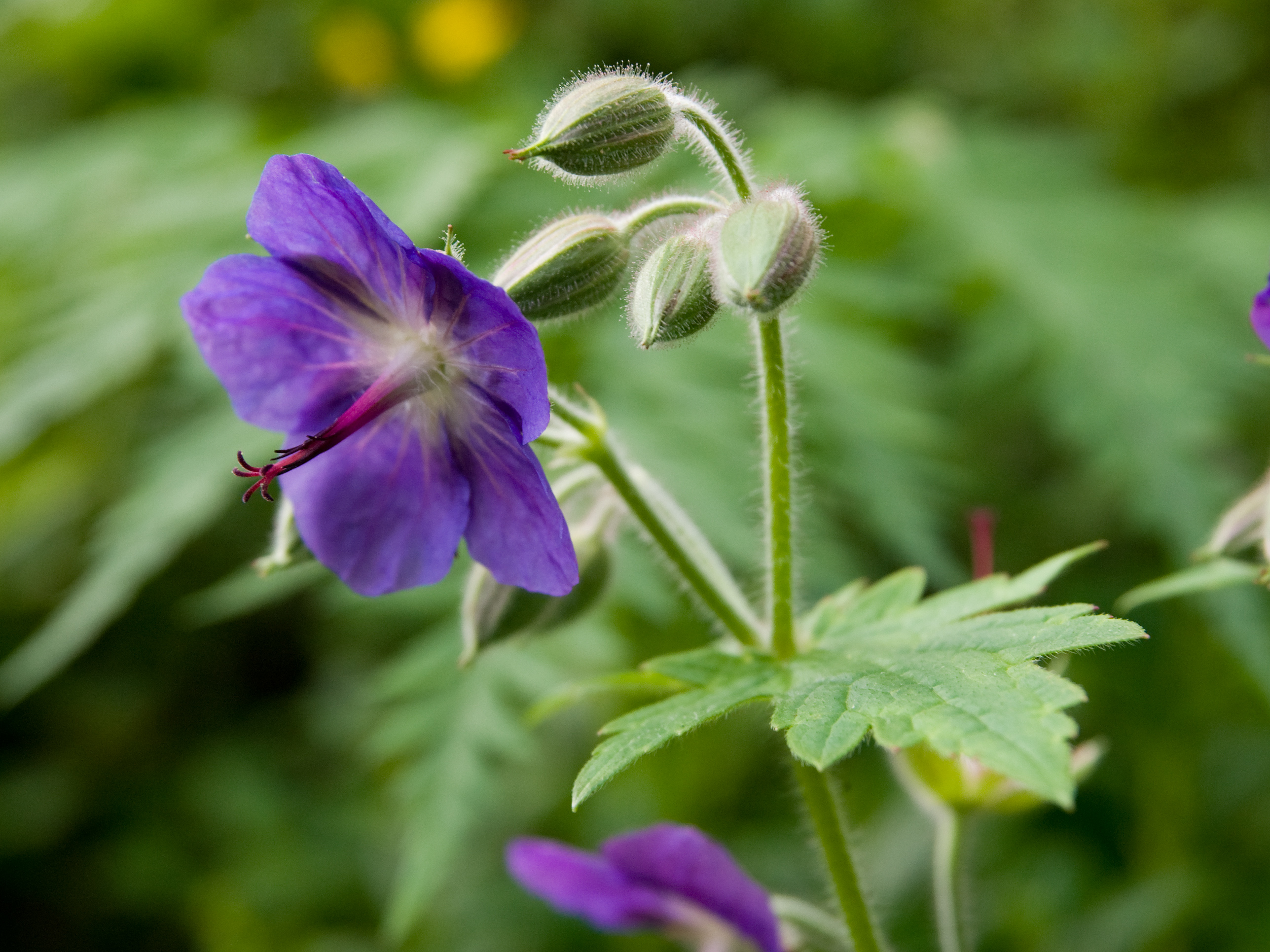 タカネグンナイフウロ (学名:Geranium eriostemon var. reinii f. onoei)